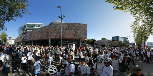 Randonnée